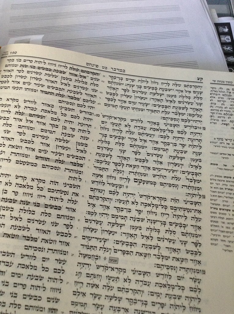 Libro religioso